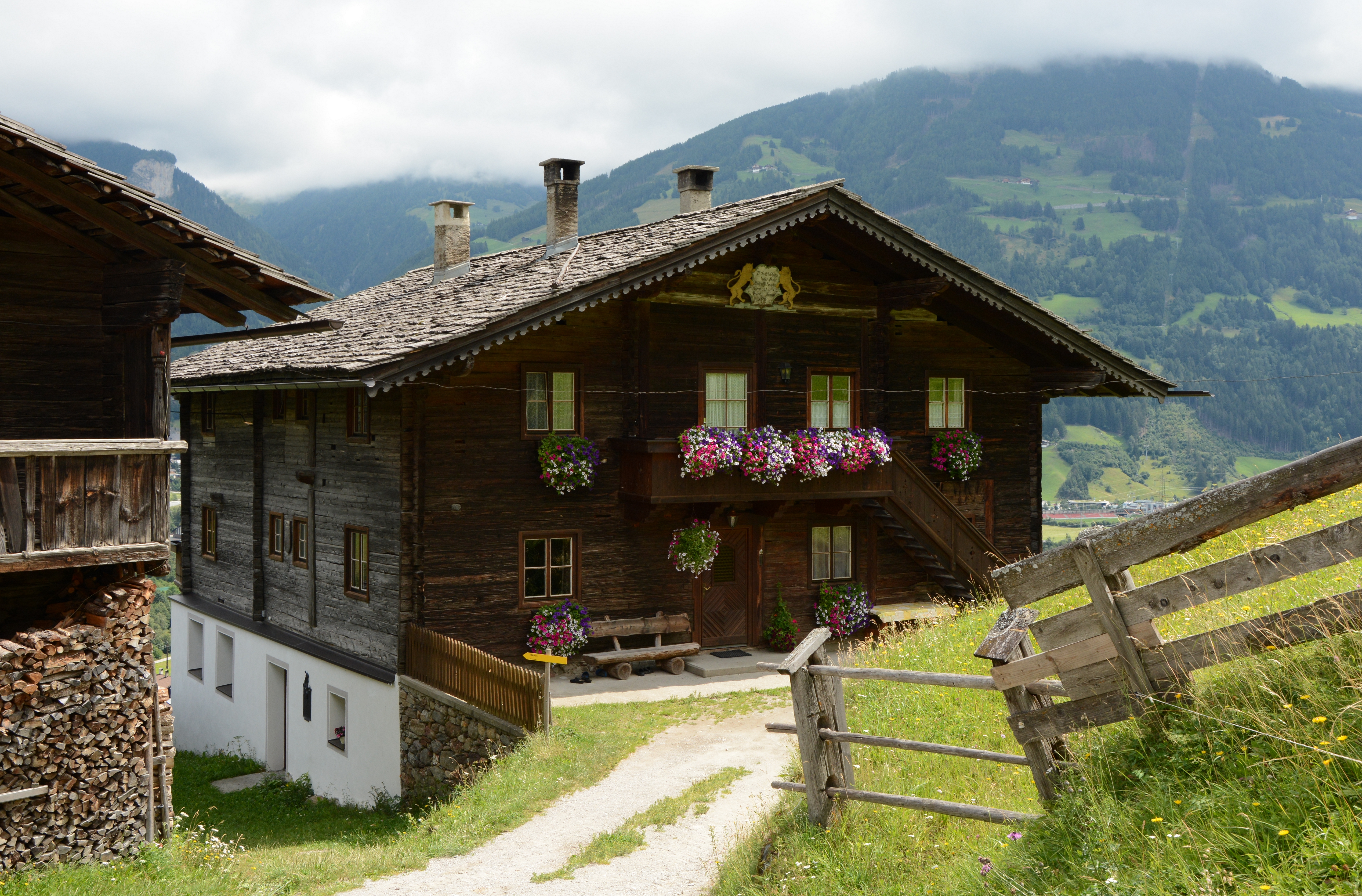 Der Messnerhofs in Ganz 15, Gemeinde Matrei in Osttirol.